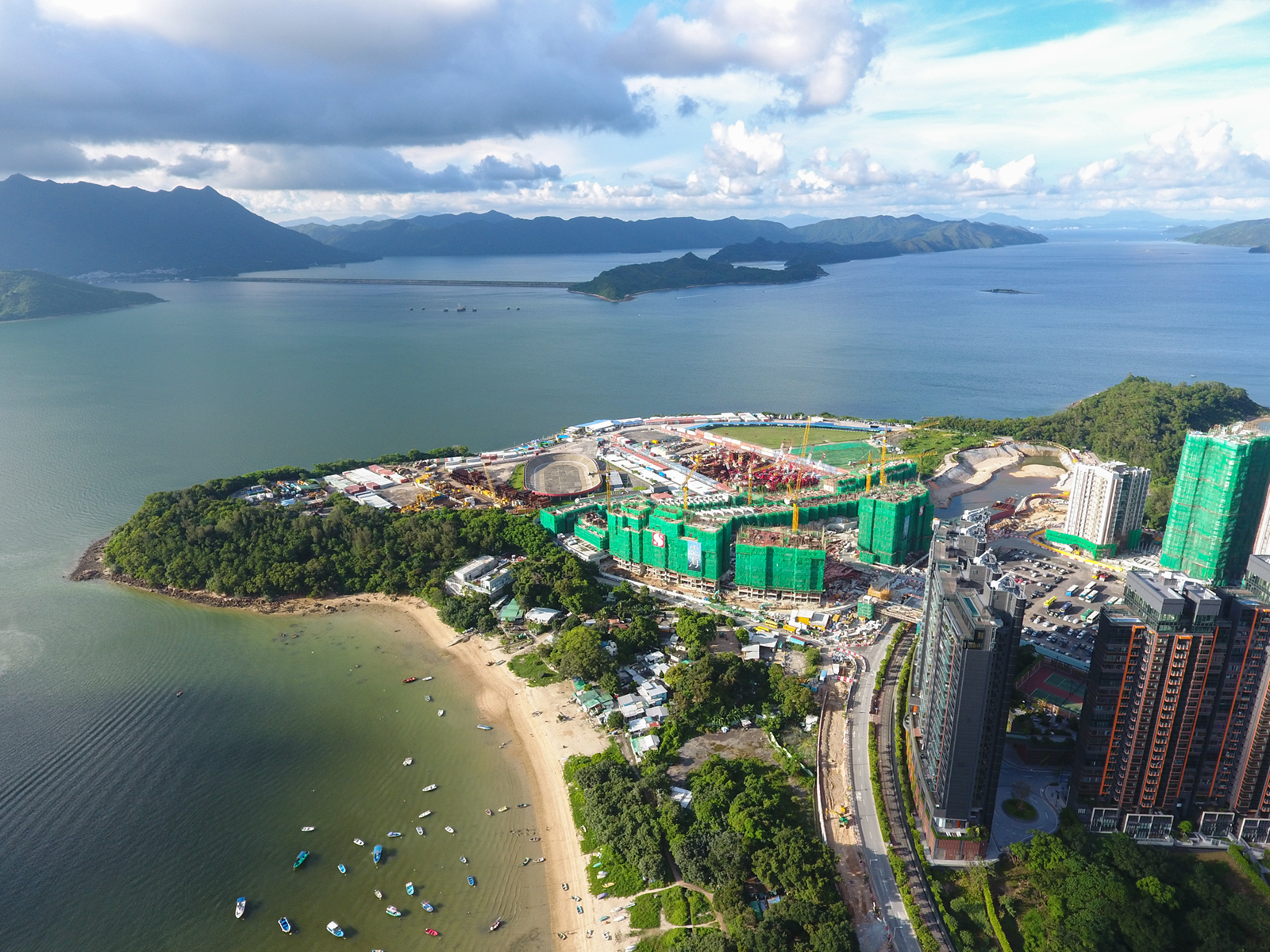 Pak Shek